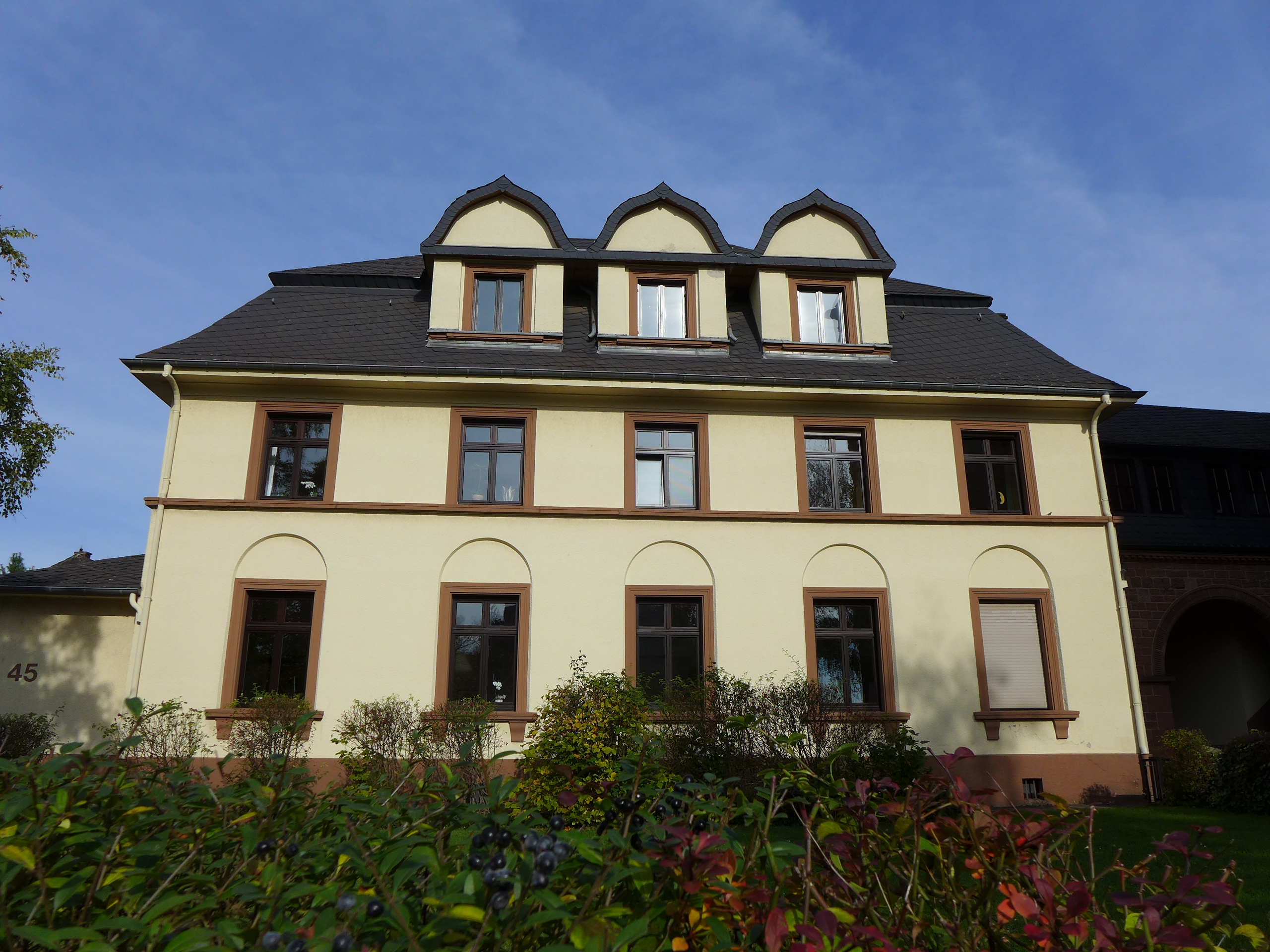 Saardom, Pfarrhaus